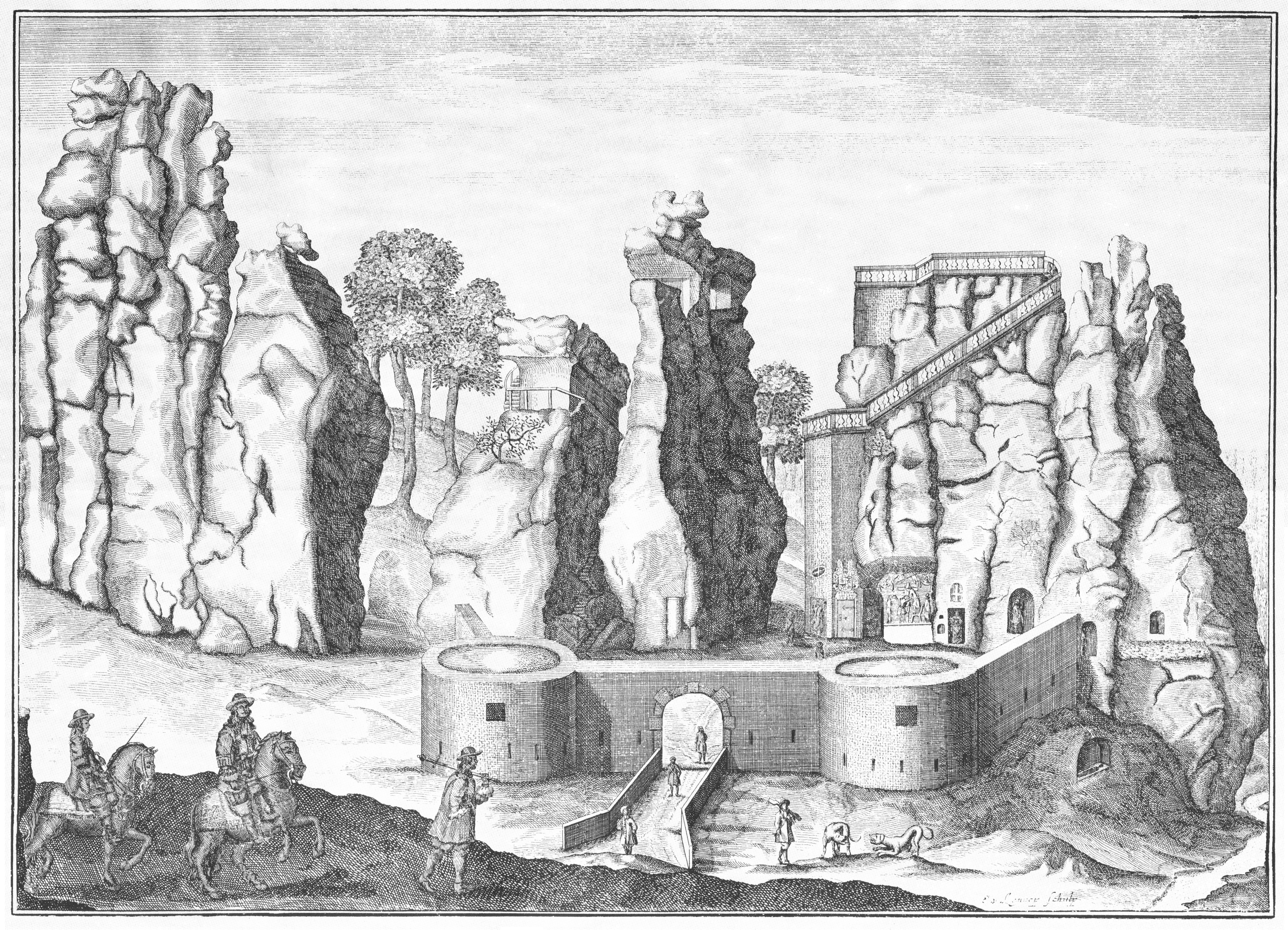 Die Externsteine mit dem landesherrlichen Jagdschloss, Kupferstich von 1663